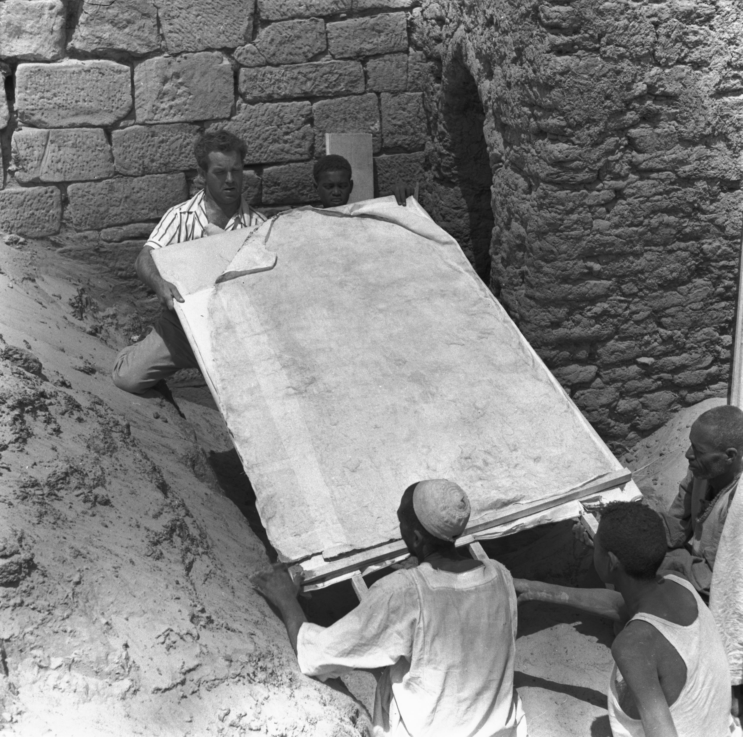 Wykopaliska w Faras